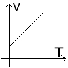 MUV 4